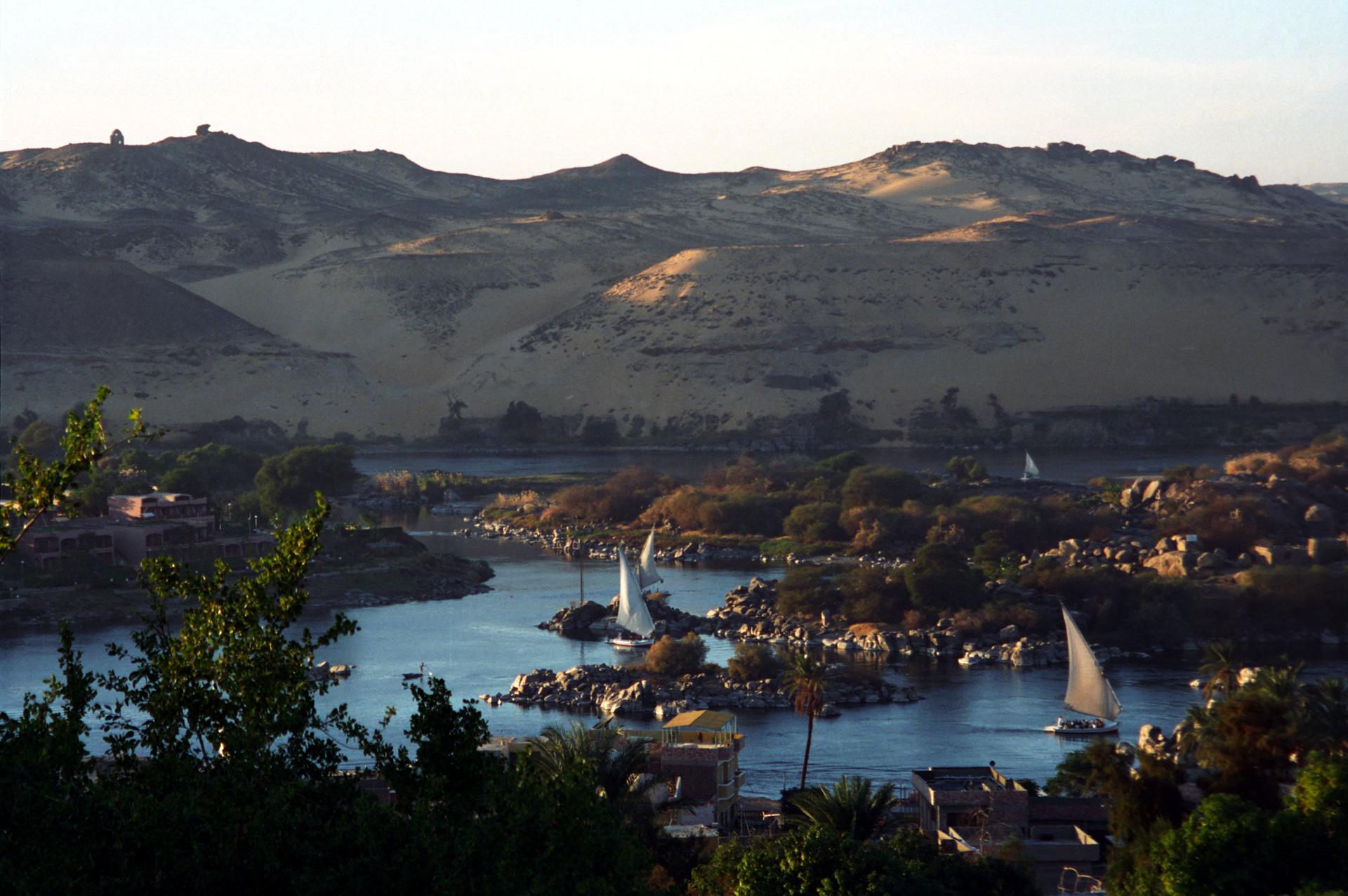 Nile